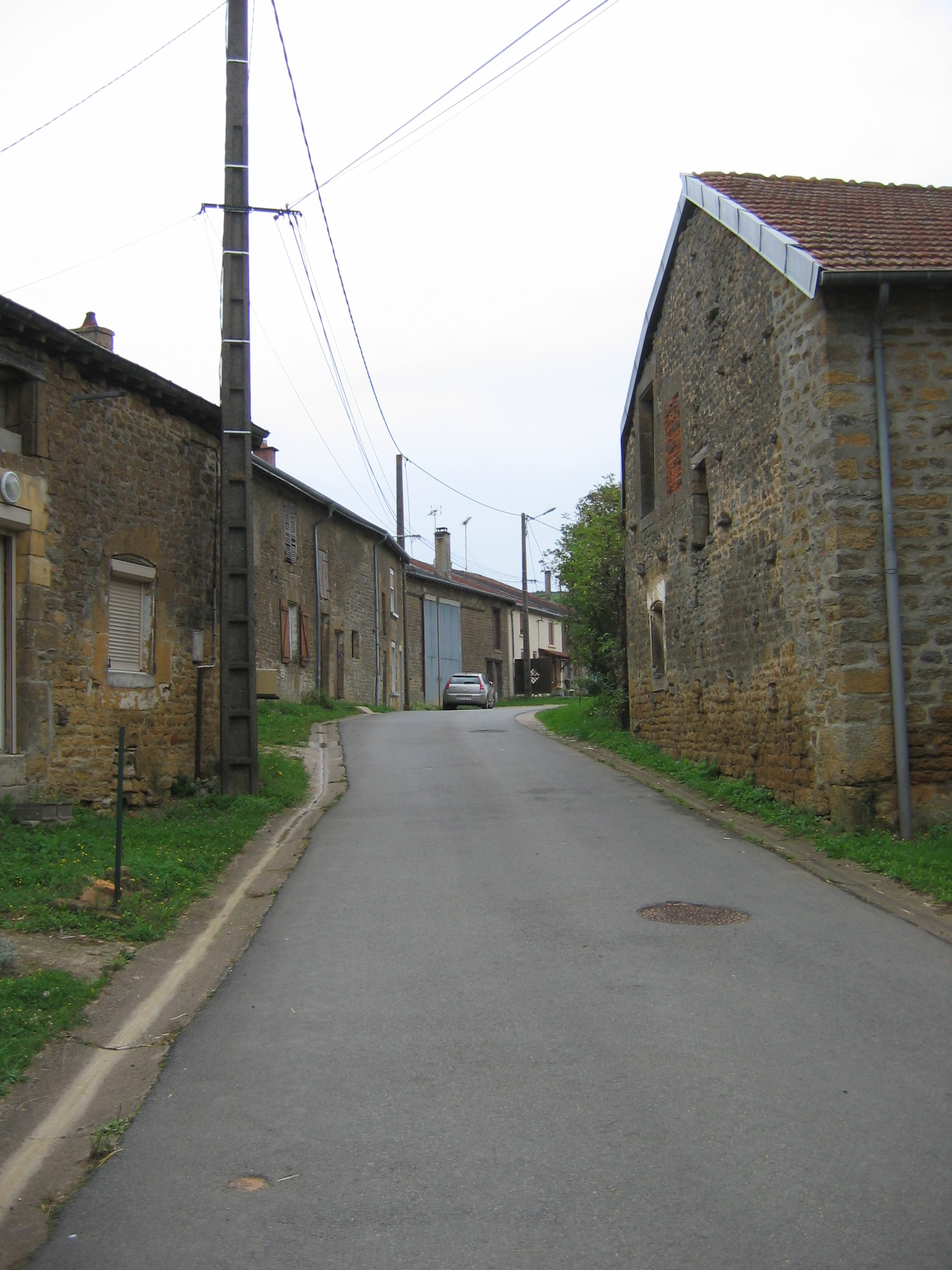 Village Amblimont Ardennes France